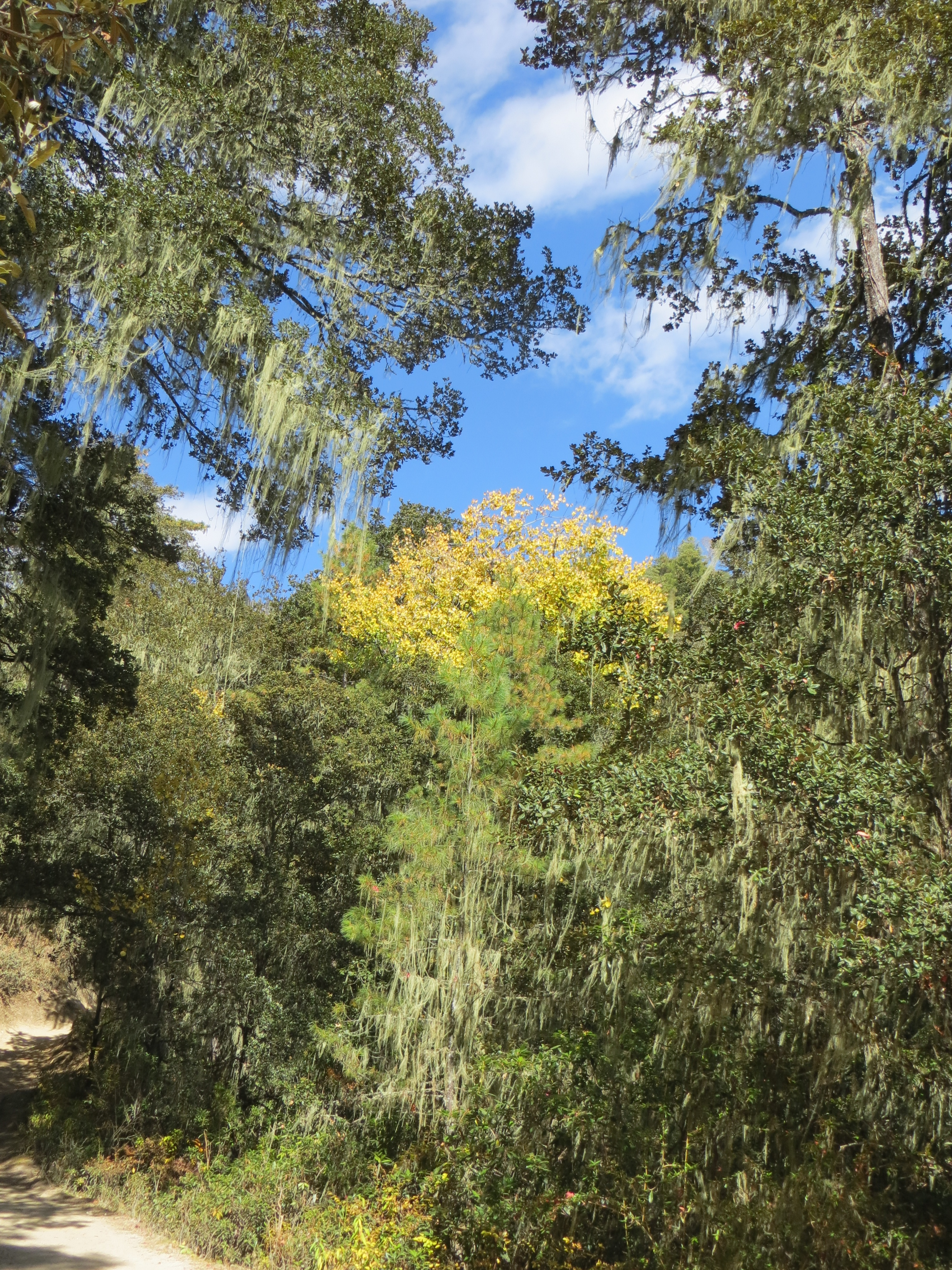 Paro 2-45